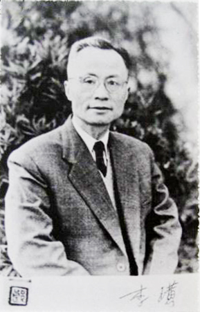 李璜